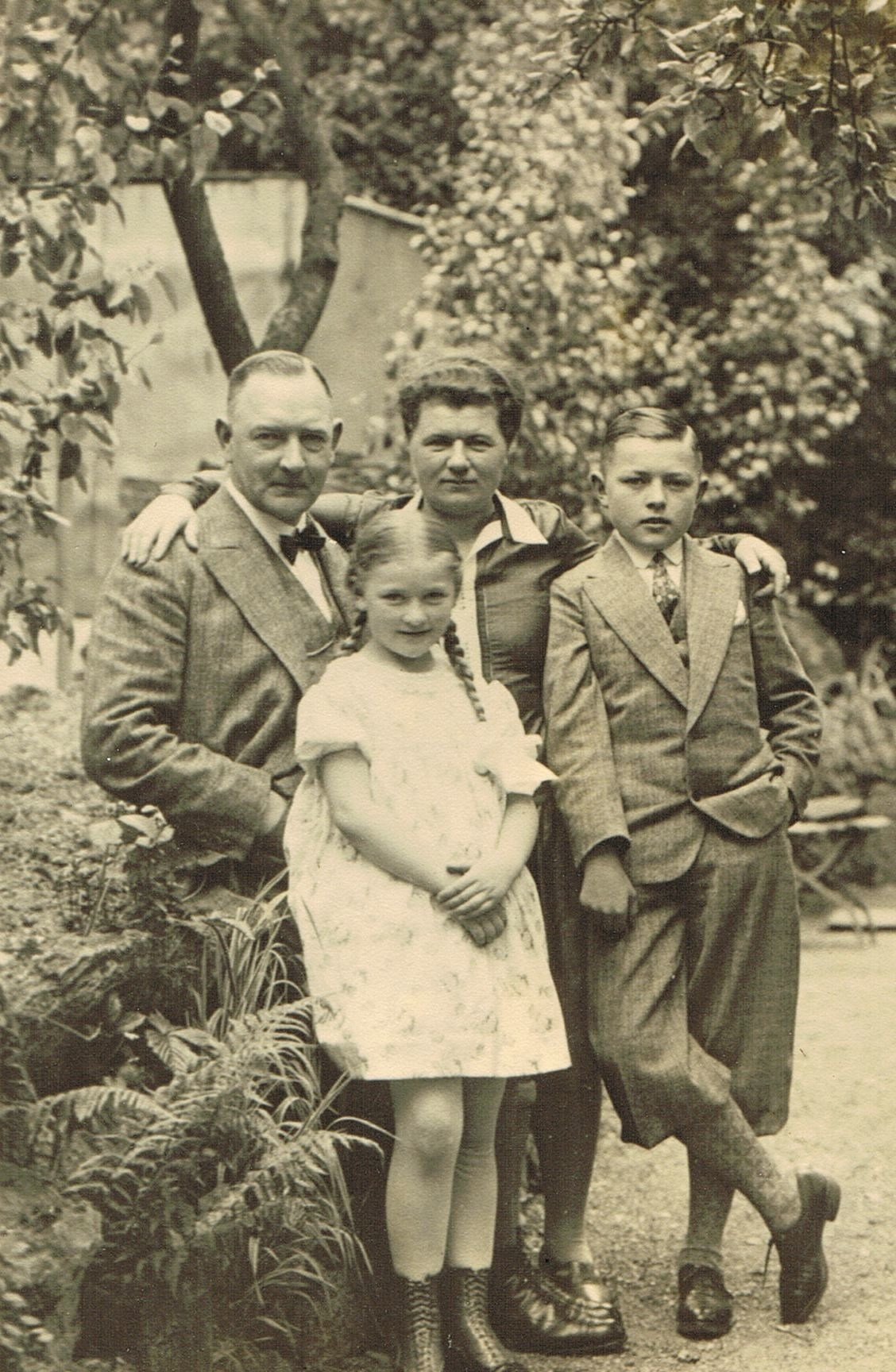 F.K. als aufstrebender Unternehmer der Weimarer Republik